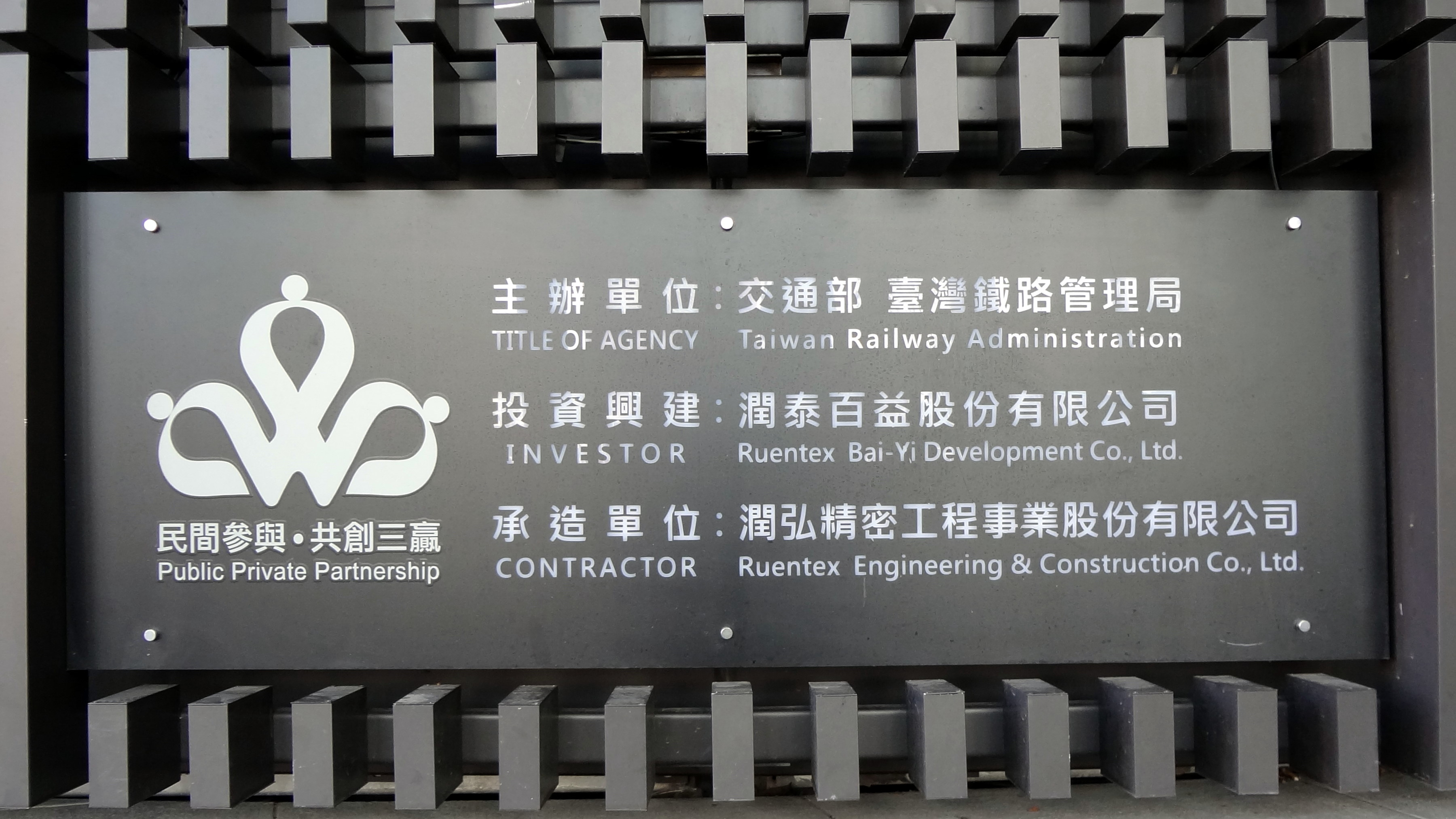 潤泰松山車站大樓興建工程紀念牌，臺灣鐵路管理局主辦，潤泰百益投資興建，潤弘精密承造。